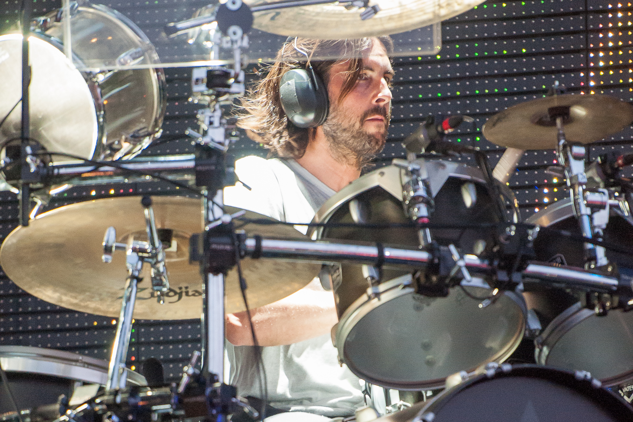 ARGO-Konzerte,Centerstage,Konzert,Linkin Park,Livekonzert,Livemusik,Musik,RiP,Rob Bourdon,Rock im Park 2014